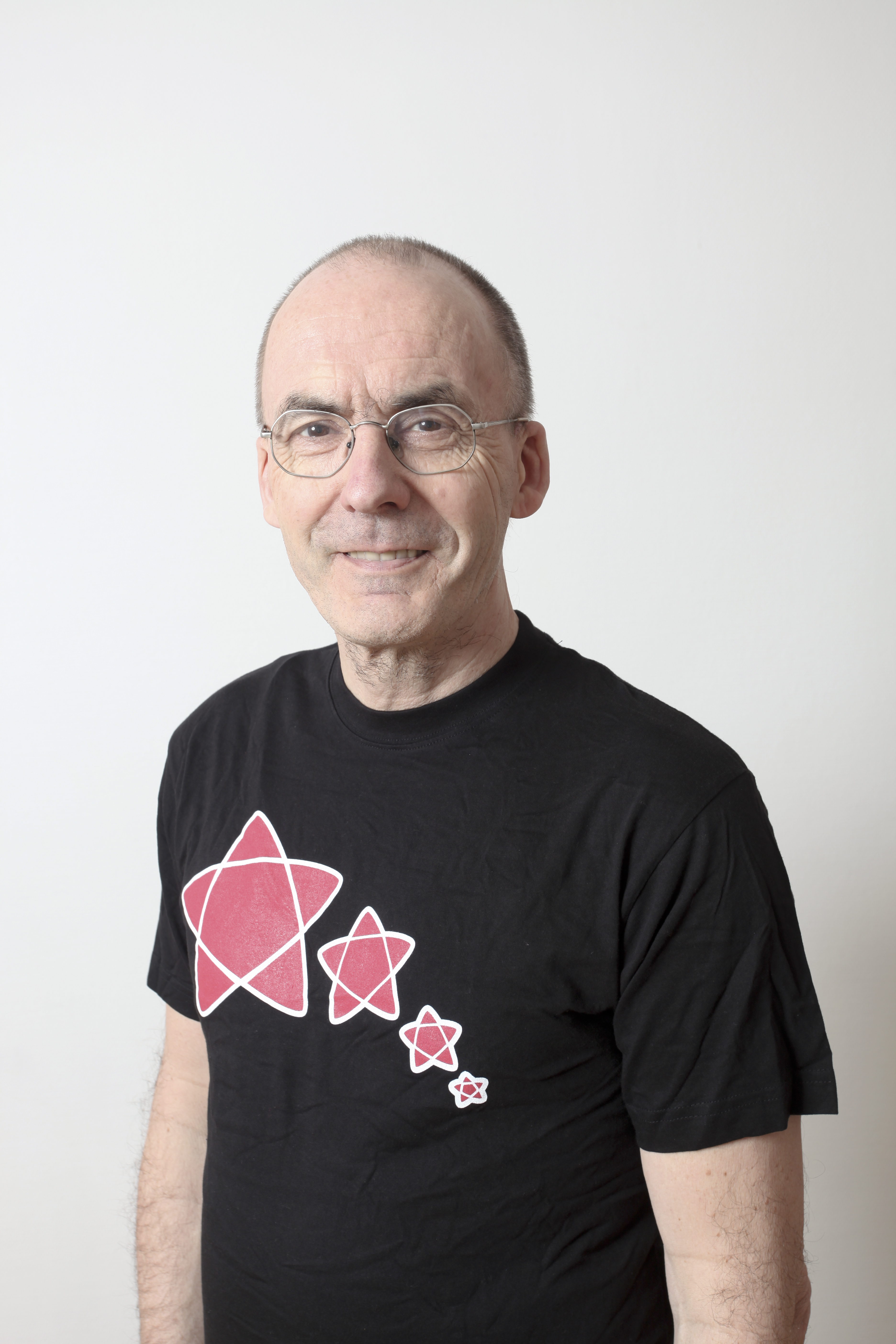 Erling Folkvord, Raudt-politikar frå Oslo.